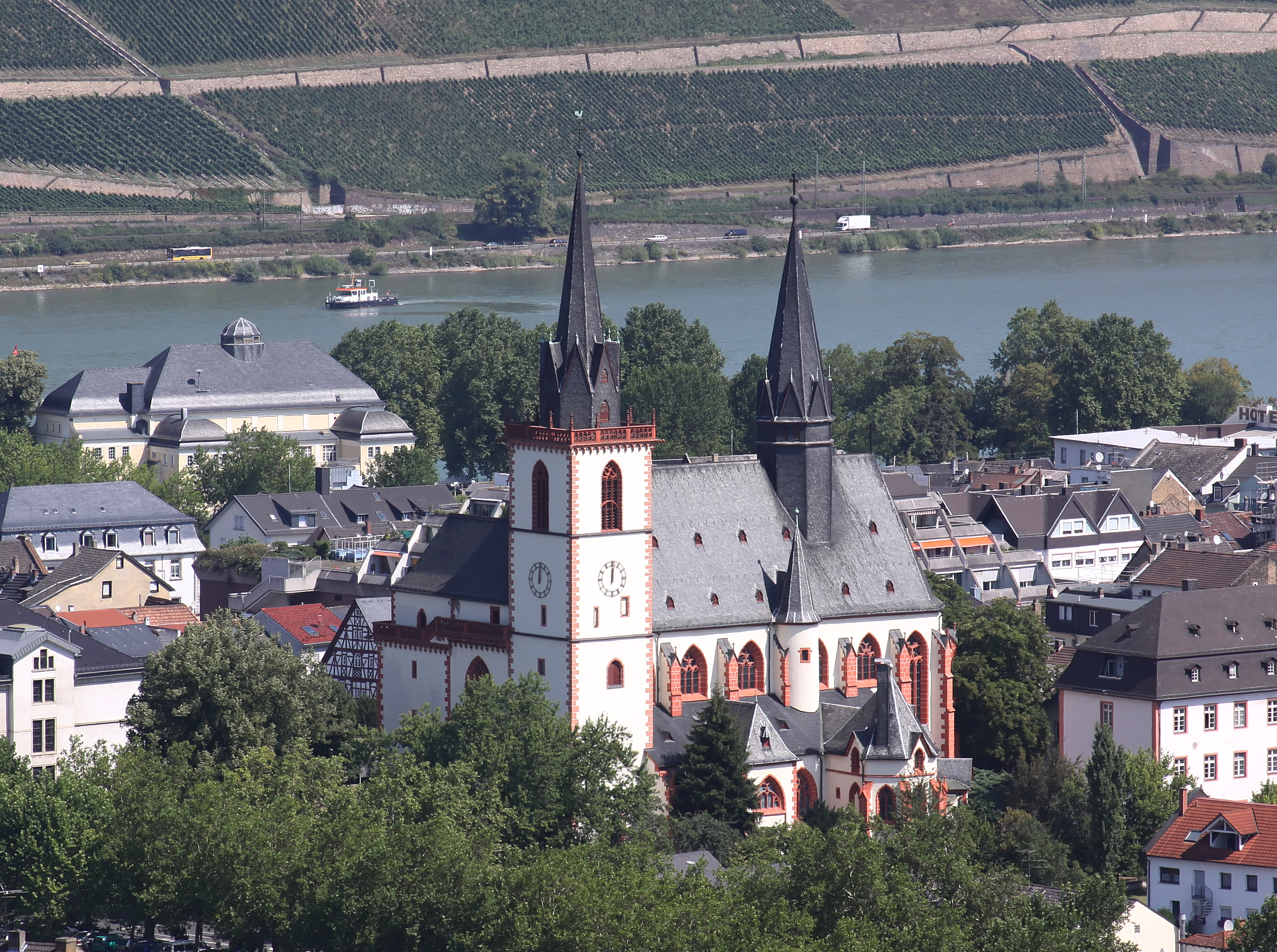 Ehemalige Stiftskirche, heutige katholische Pfarrkirche St. Martin in Bingen am Rhein/Deutschland; nach dem Brand im Jahr 1403 im gotischen Stil wieder aufgebaut.